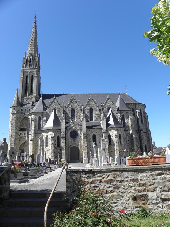 Flanc sud de l'église Saint-Pierre-et-Saint-Paul d'Étrelles (35).